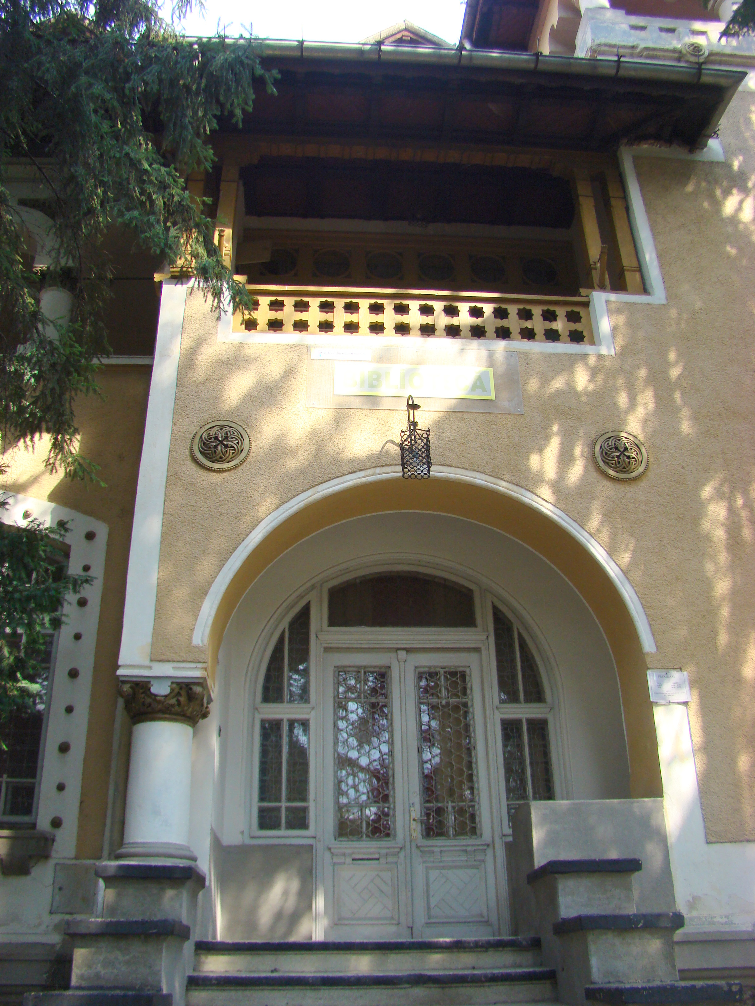 Vila Rozelor, municipiul Curtea de Argeș, Bd. Basarabilor 47